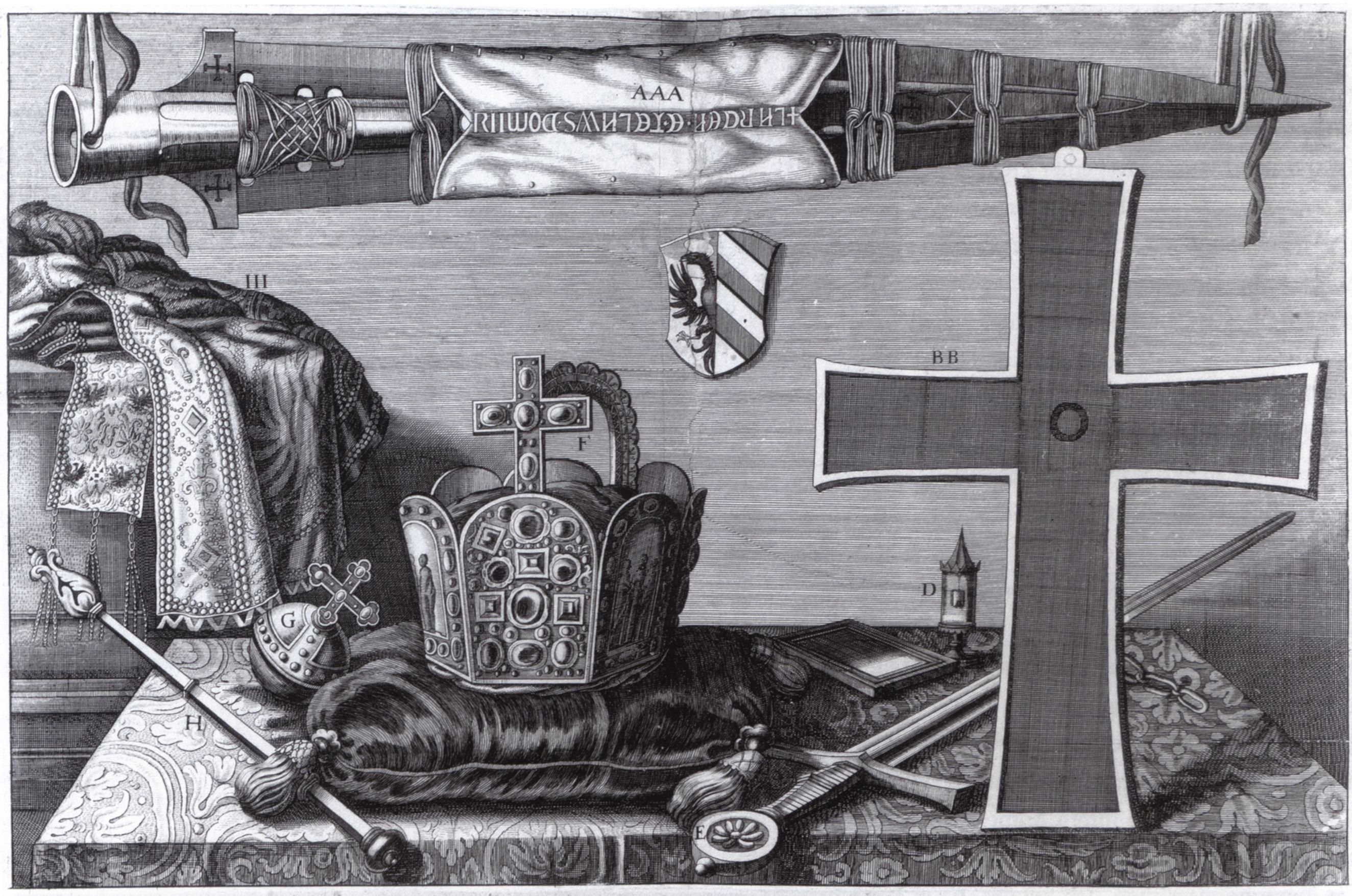 Eigentliche Vorbildung der Heylthumb und des Keyserlichen Ornats, Darstellung der Reichskleinodien auf einem Flugblatt